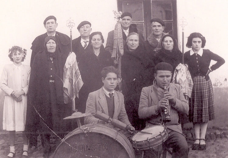 Coreses (Zamora) - Águedas, finales años 40 - Fotografía 195 x 130 B/N